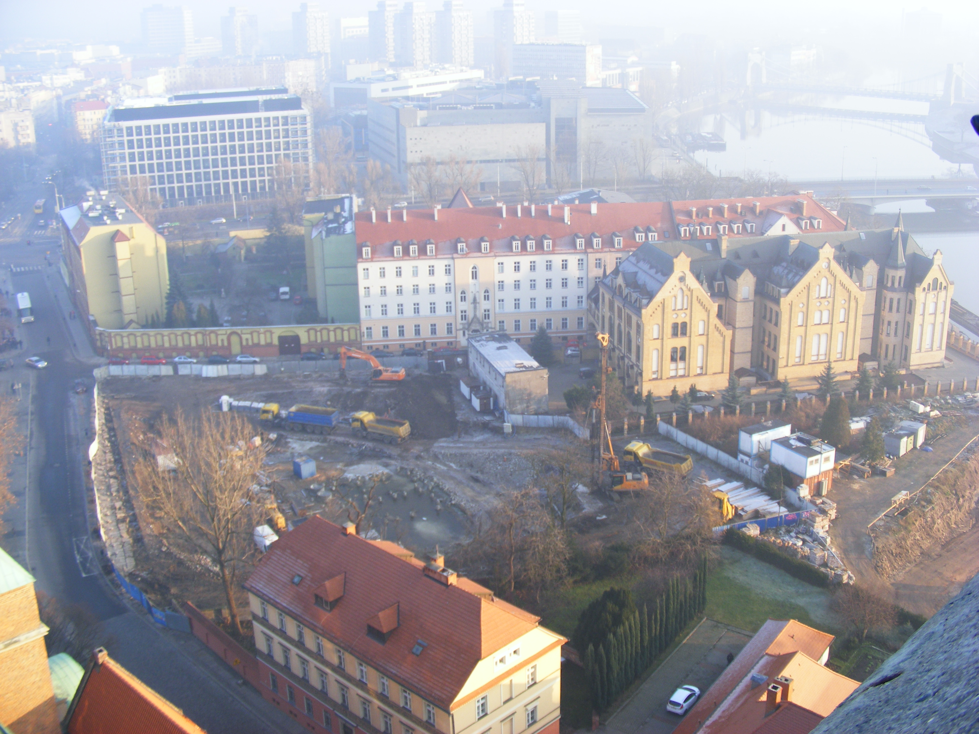 Wrocław w grudniu 2013.